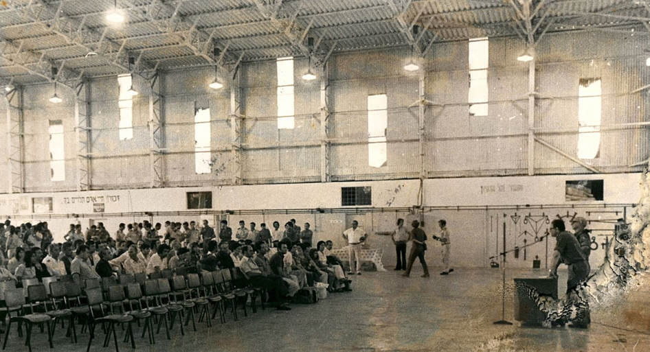 בתמונה מימין, אנו רואים את ראש אמ"ן שלמה גזית, מתדרך את פדויי השבי מאנטבה עם רדתם מהמטוס בתל נוף ("עקרון"), לפני המראתם ללוד (הבדק). לפני הנחיתה בלוד היתה נחיתה בתל נוף ושם אמרו לפדויי השבי שהם צריכים לשמור על סודיות. הצוות הצרפתי של המטוס שמר על סודיות עד היום.